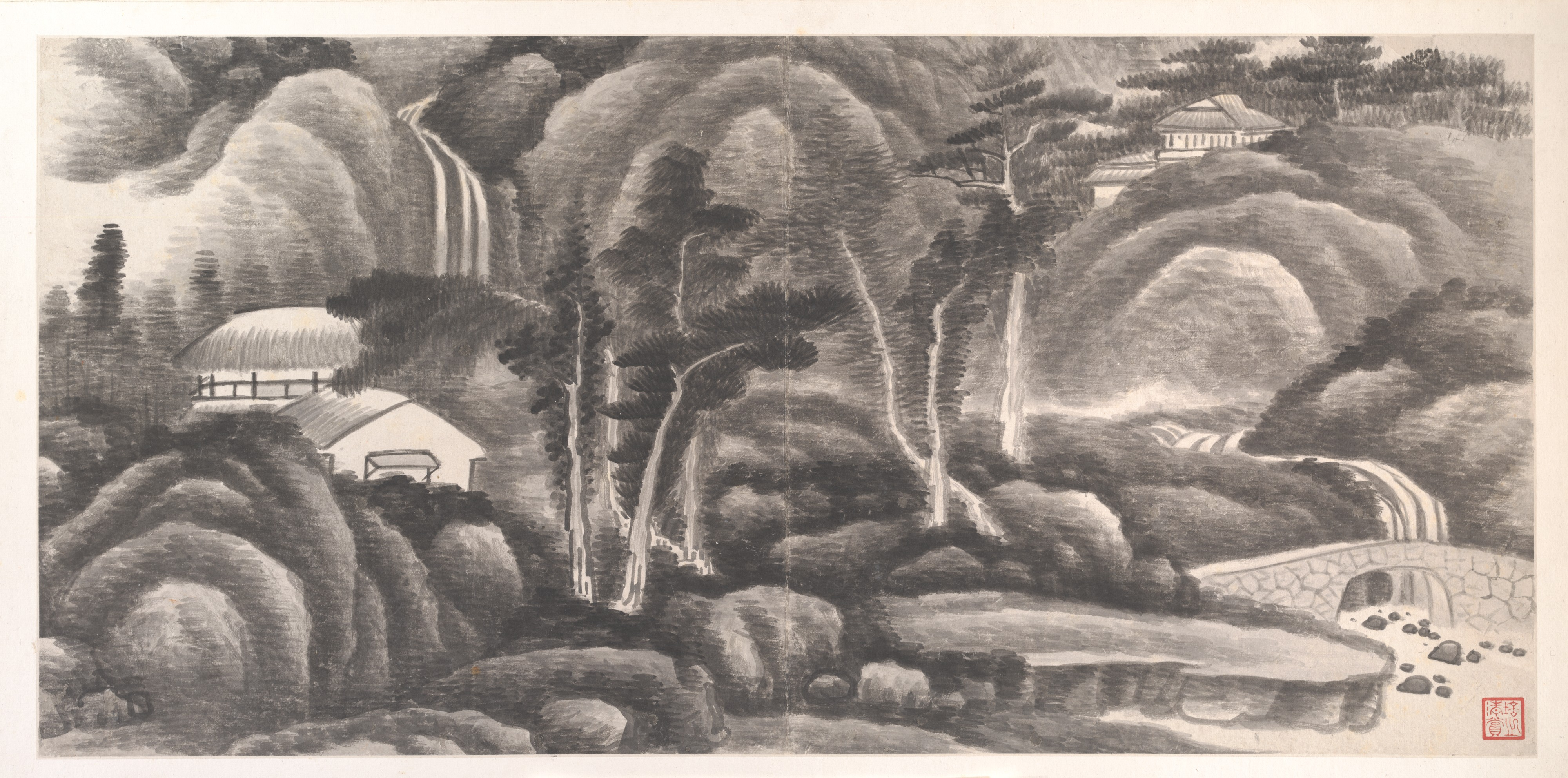 China; Album; Paintings